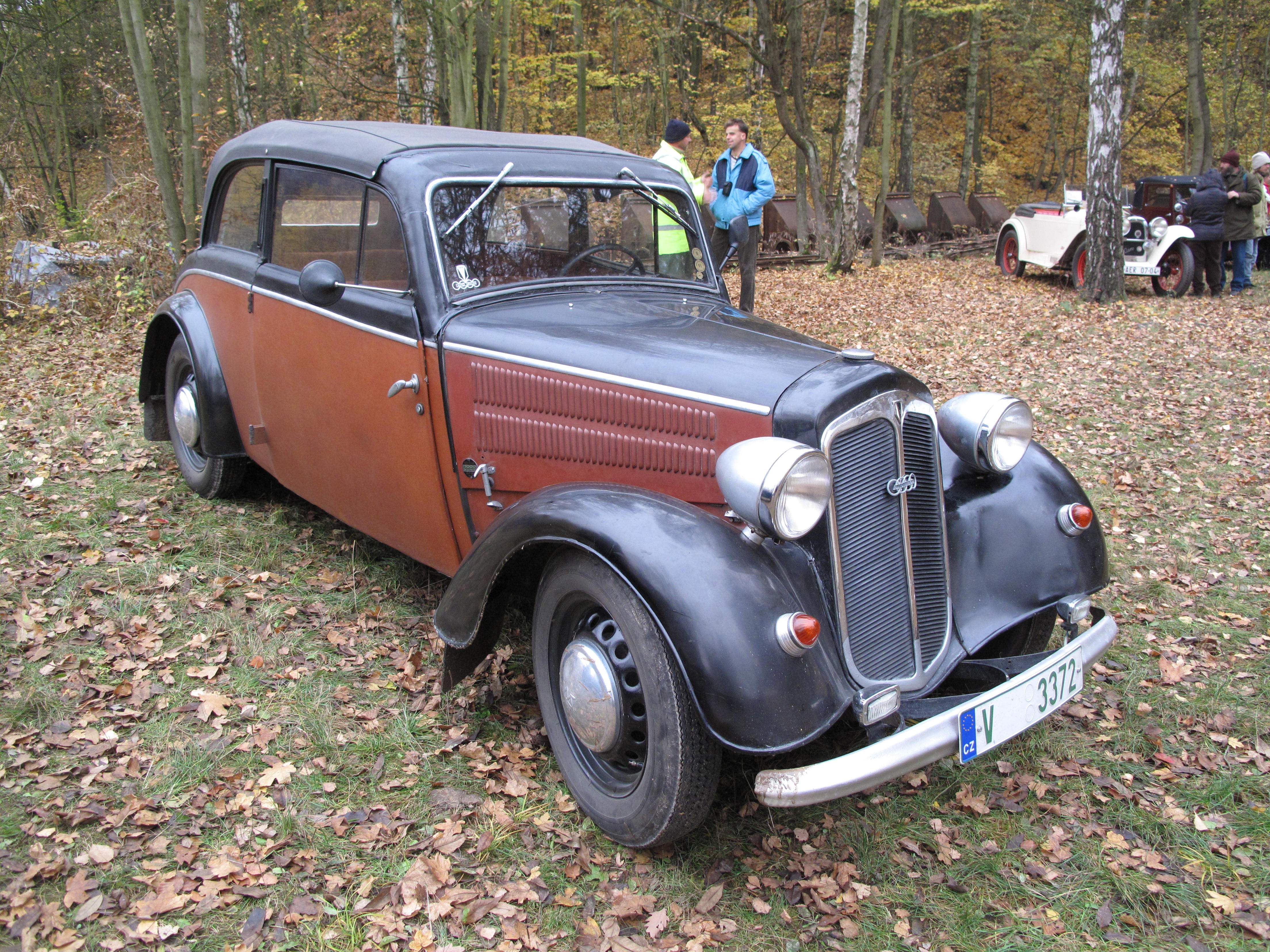 Solvayovy lomy